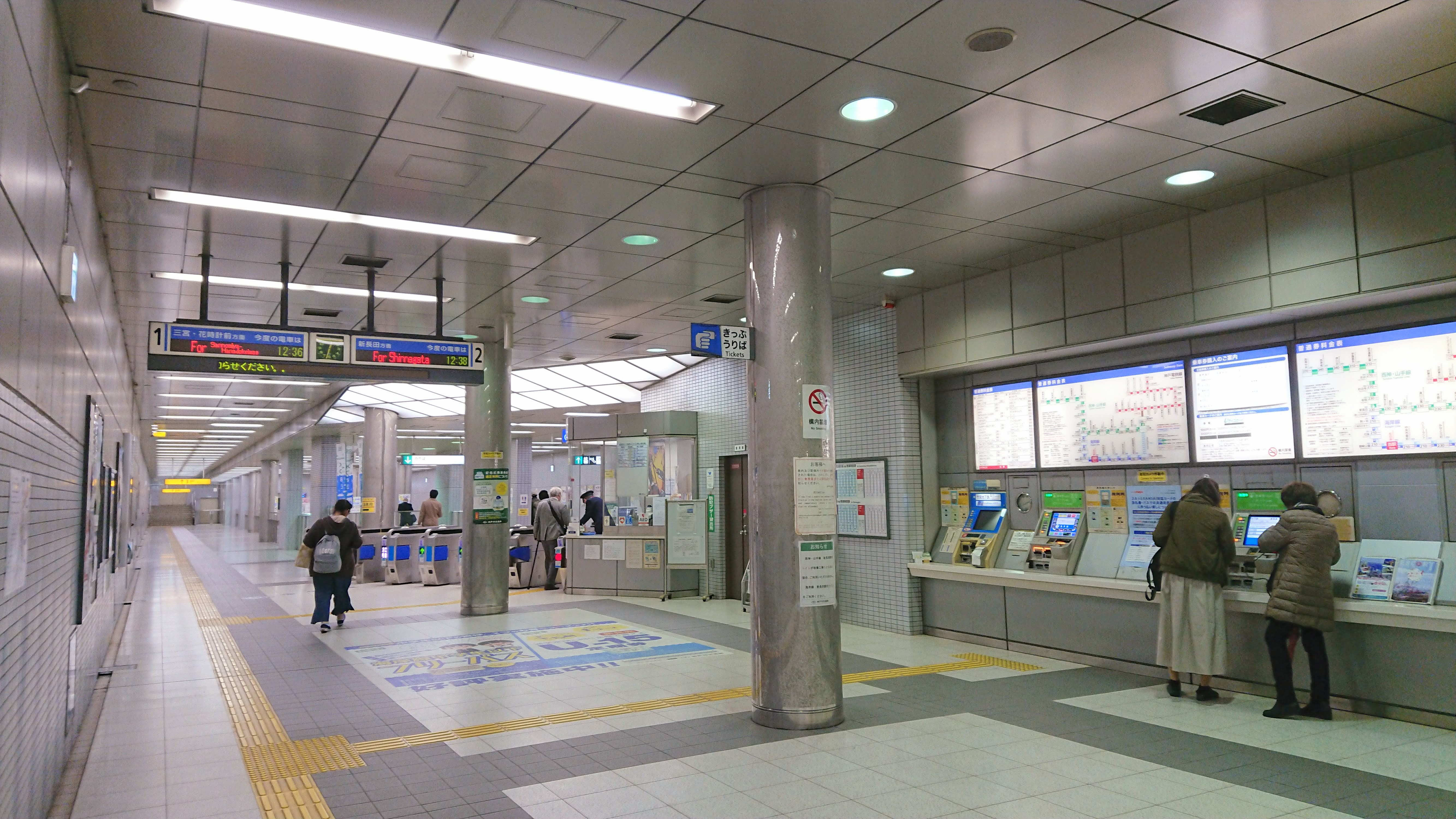 神戸市交通局（神戸市営地下鉄）海岸線 和田岬駅 改札口付近（改札外より）